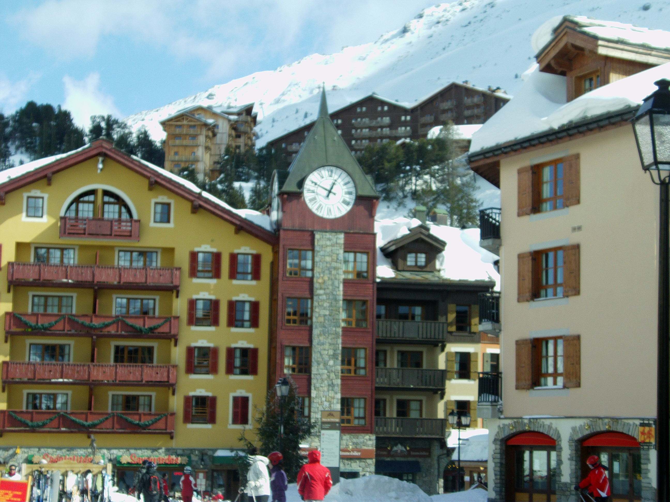 les arcs 1950.